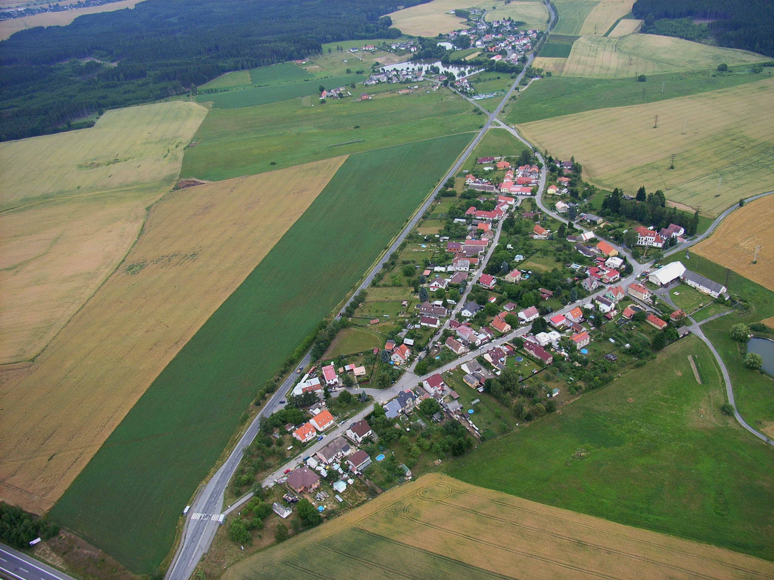 Místní části Záluží a Hlinice (v pozadí)